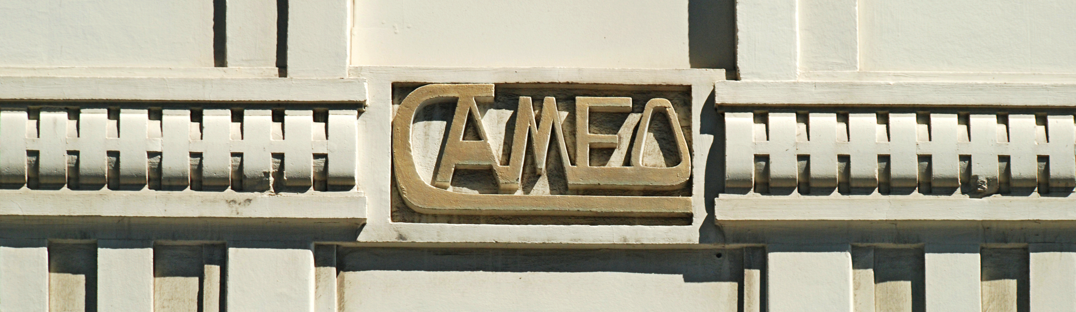 Belgique - Bruxelles - Ancien cinéma Caméo (Art déco, architecte Gaston Ide, 1925)